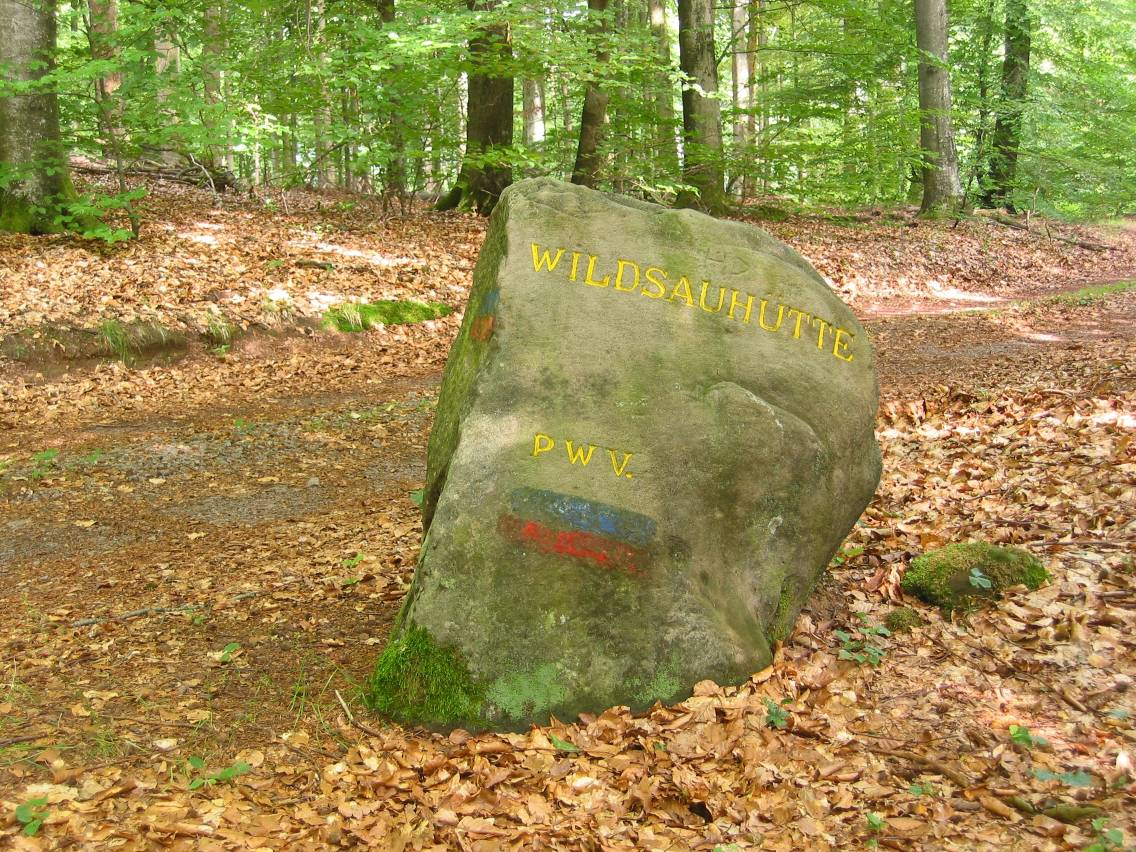 Ritterstein Nummer 50, Wildsauhütte